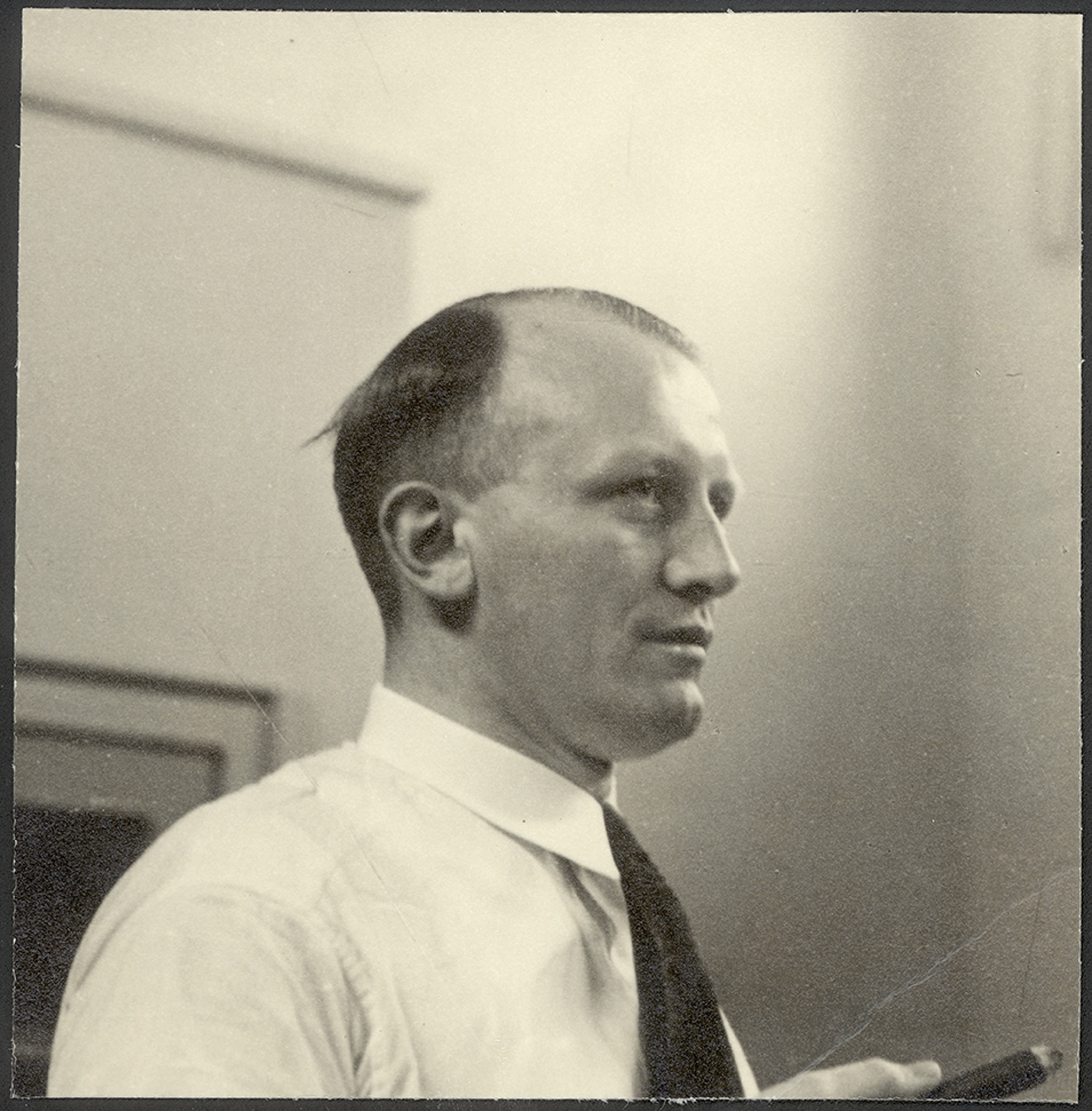 Beckmann, Joachim Pfarrer Düsseldorf, Freie Evangelische Synode Barmen 3. und 4. Januar 1934, Abgabe: Heinz Joachim Held 05/2006 Bestand: AEKR Düsseldorf 8SL 046 (Bildarchiv), 80018_03